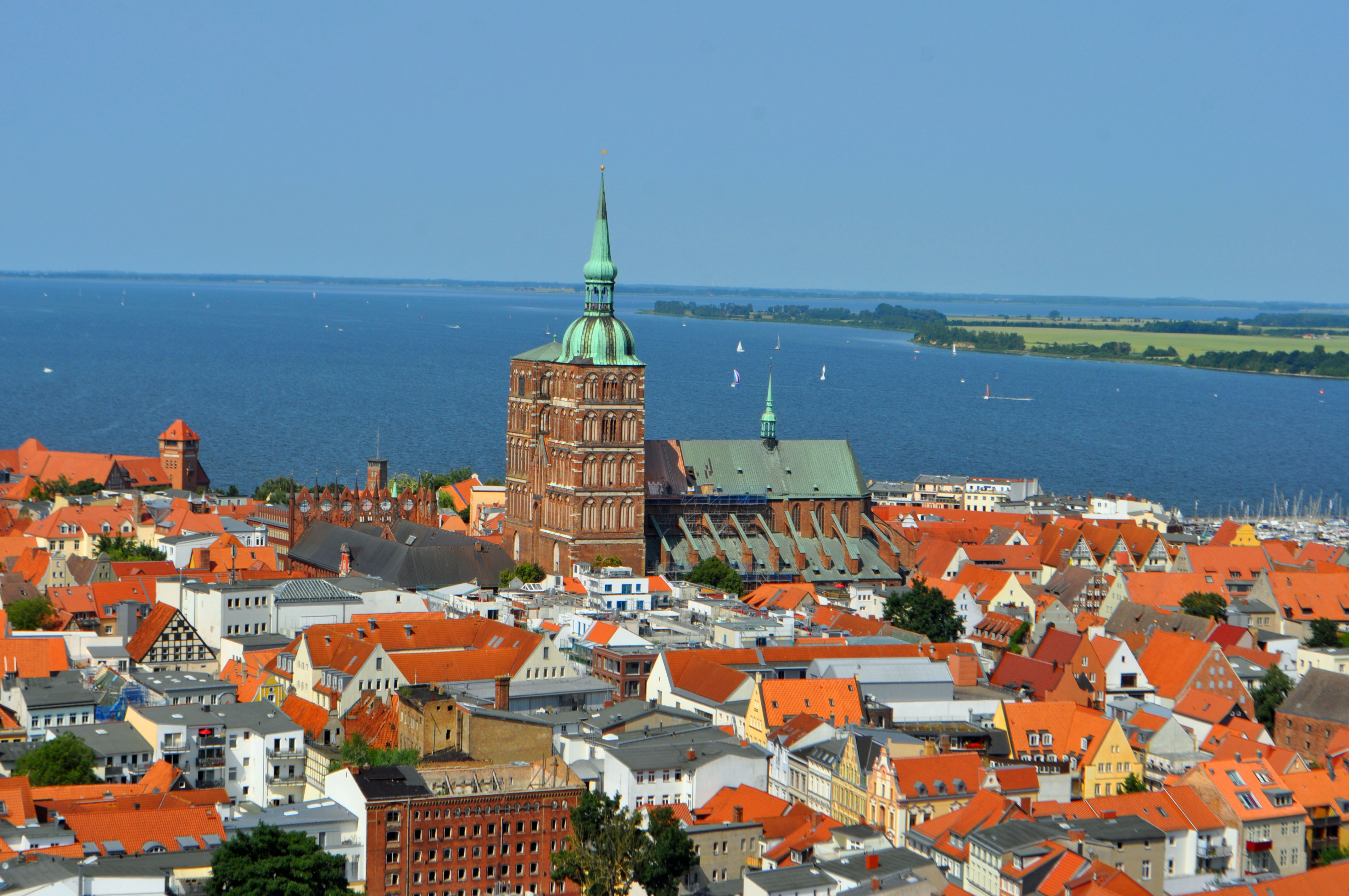 Fotografiert vom Turm der Marienkirche in Stralsund. Altstadt mit Nikolaikirche.